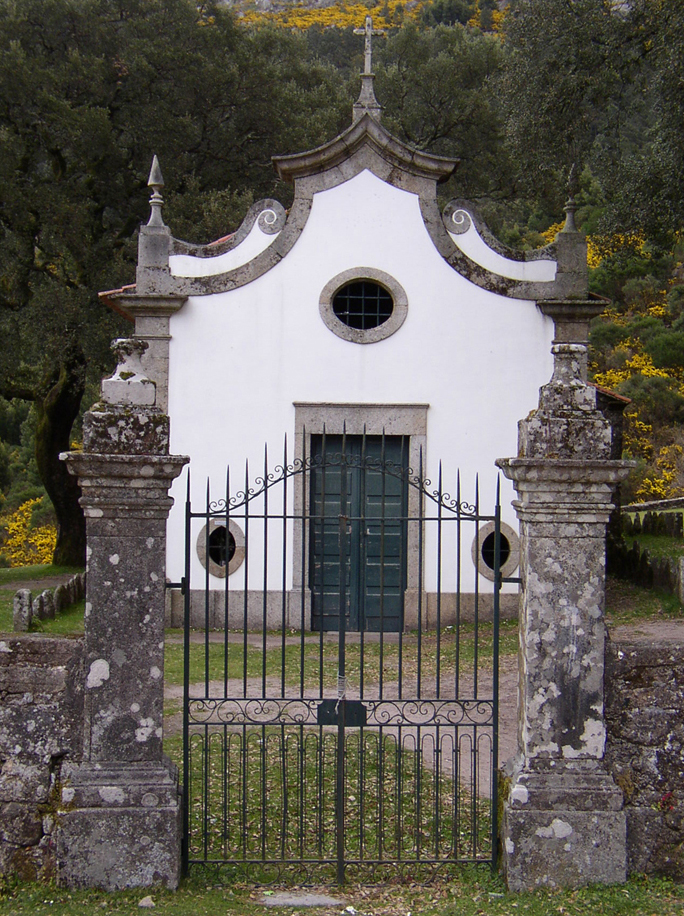 Mosteiro de São João de Arga ou Santuário de São João de Arga This file was uploaded for Wiki Loves Monuments in Portugal with the unique identifier 72533.